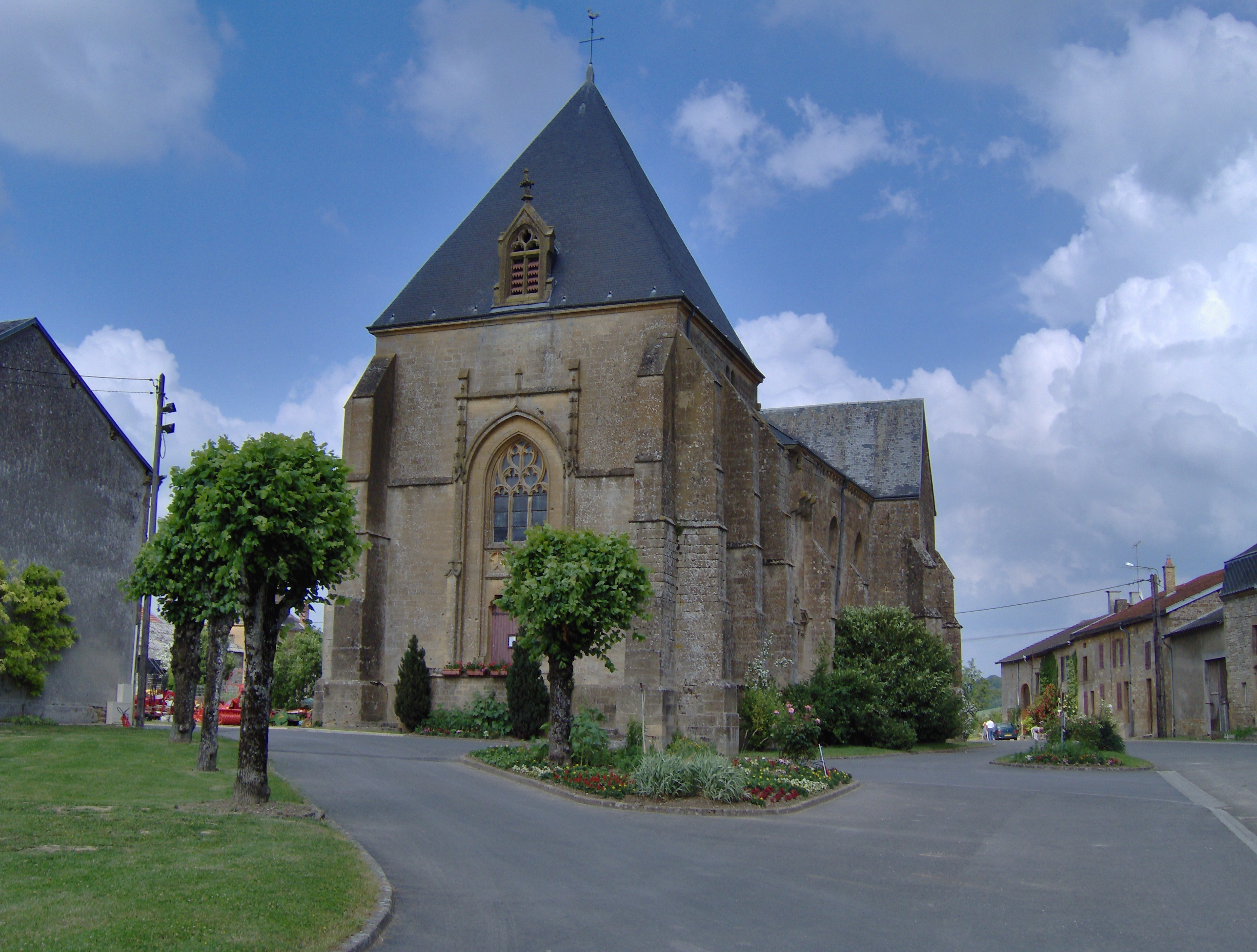 Eglise de Brieulles-sur-Bar (Ardennes, France)